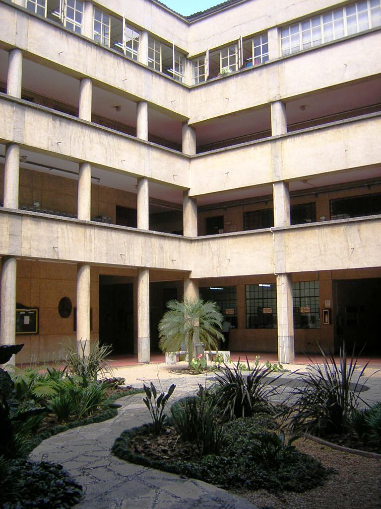 Facultad de Medicina, Universidad de antioquia. Medellín, Colombia.